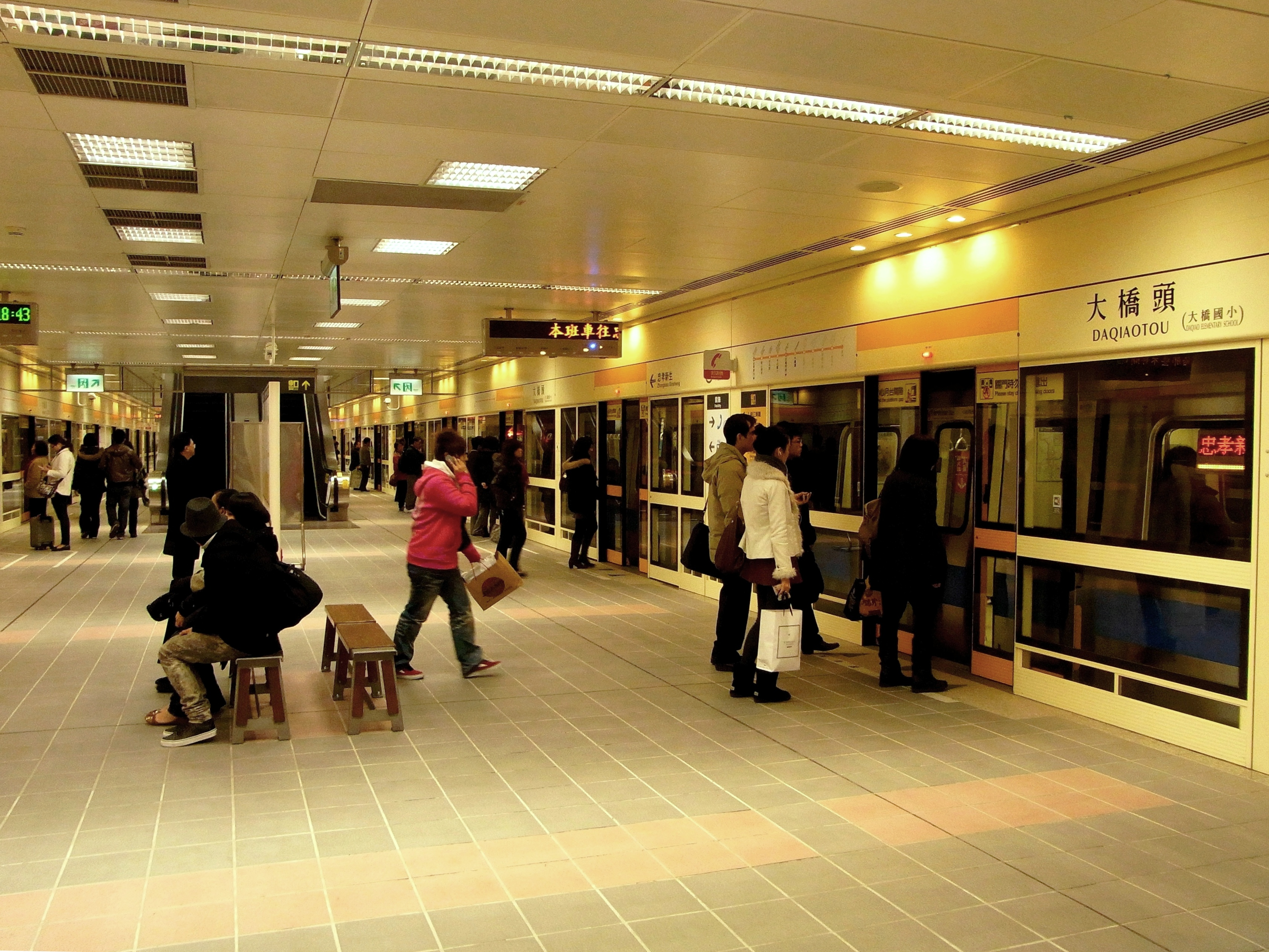 台北捷運大橋頭站月台